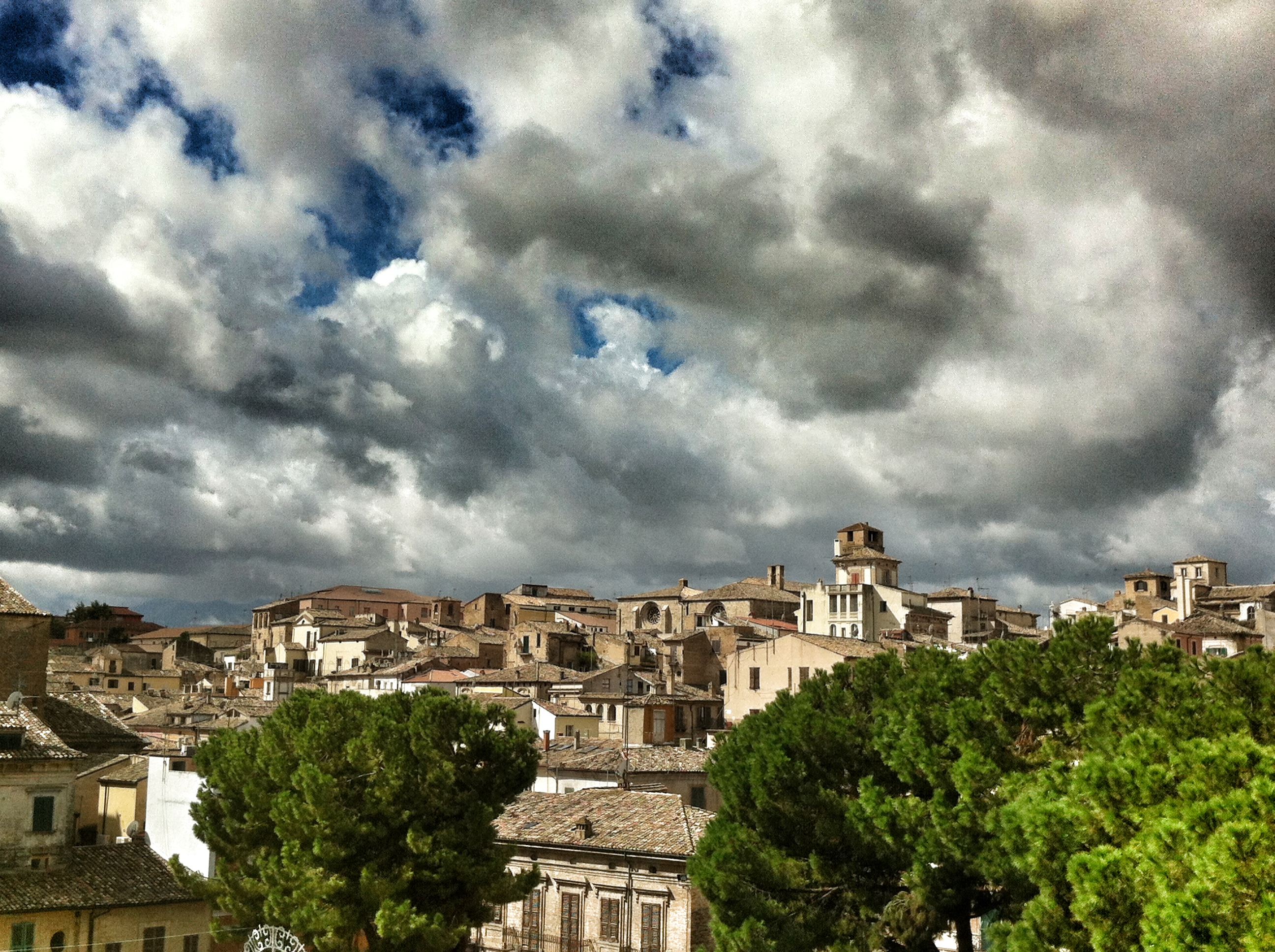 Lanciano - Il quartiere di Civitanova visto da Piazza Plebiscito - Al centro la Chiesa di Santa Maria Maggiore